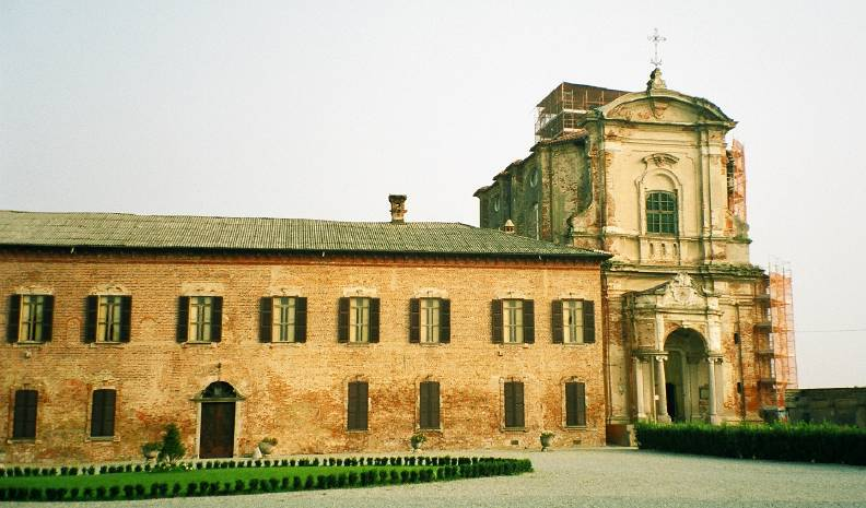 Abbazia di Lucedio (Trino). Immagine presa da en.wiki (